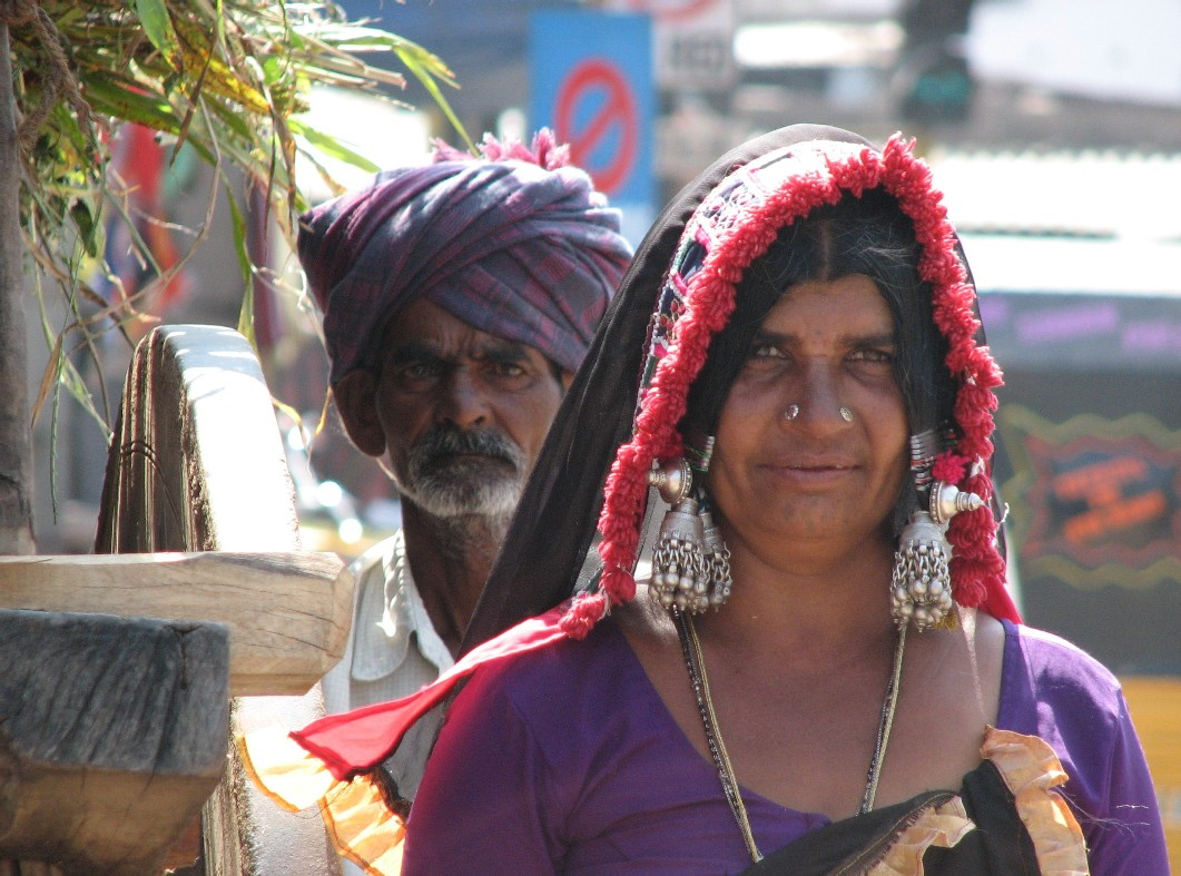 ഒരു ലംബാടി സ്തീയും പുരുഷനും. ഹൈദരാബാദ് നഗരത്തിൽ നിന്നും ഒക്ടോബർ 9/2007-ൽ എടുത്ത ചിത്രം.